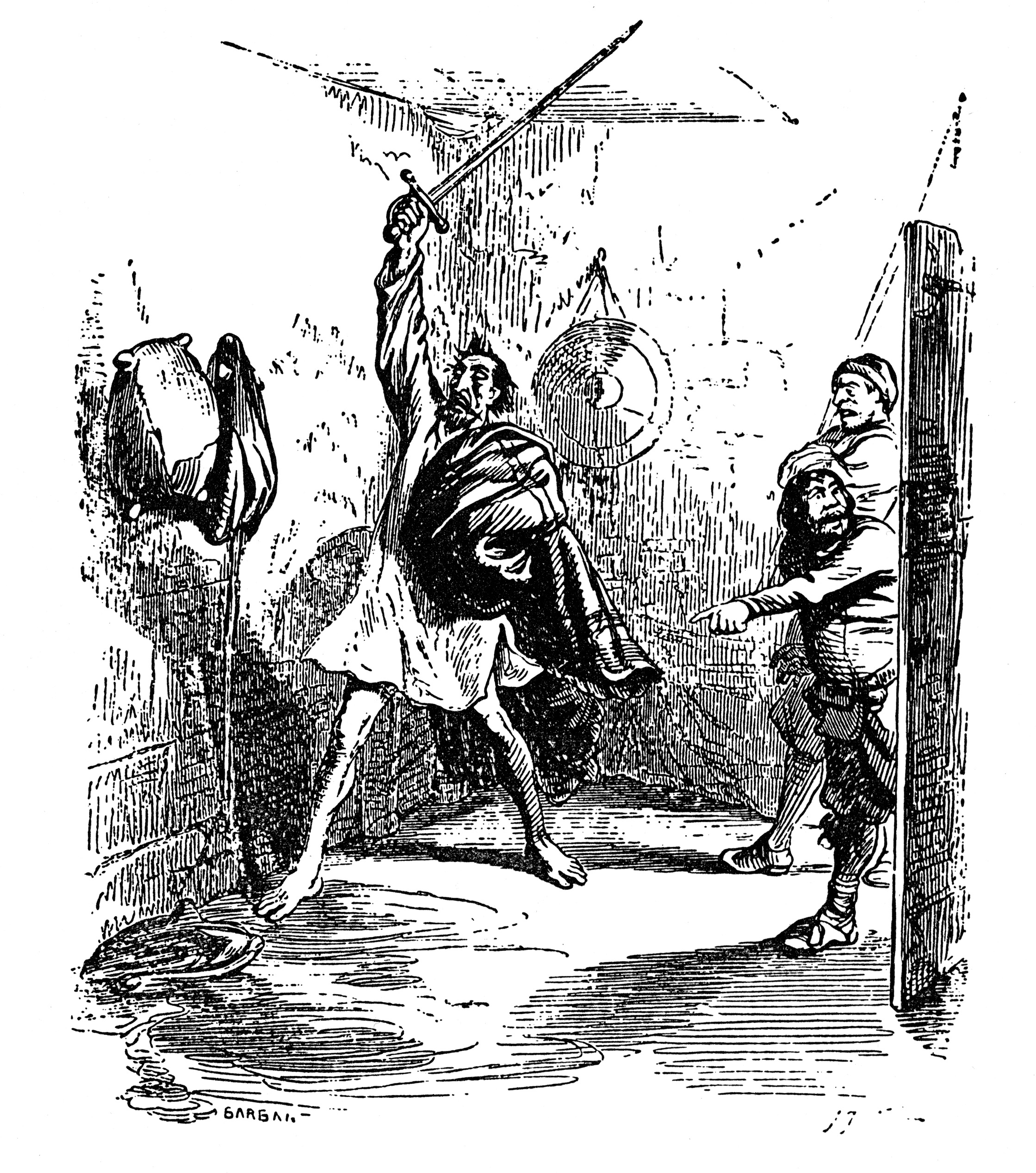 Don Quijotes Kampf mit den Rotweinschläuchen